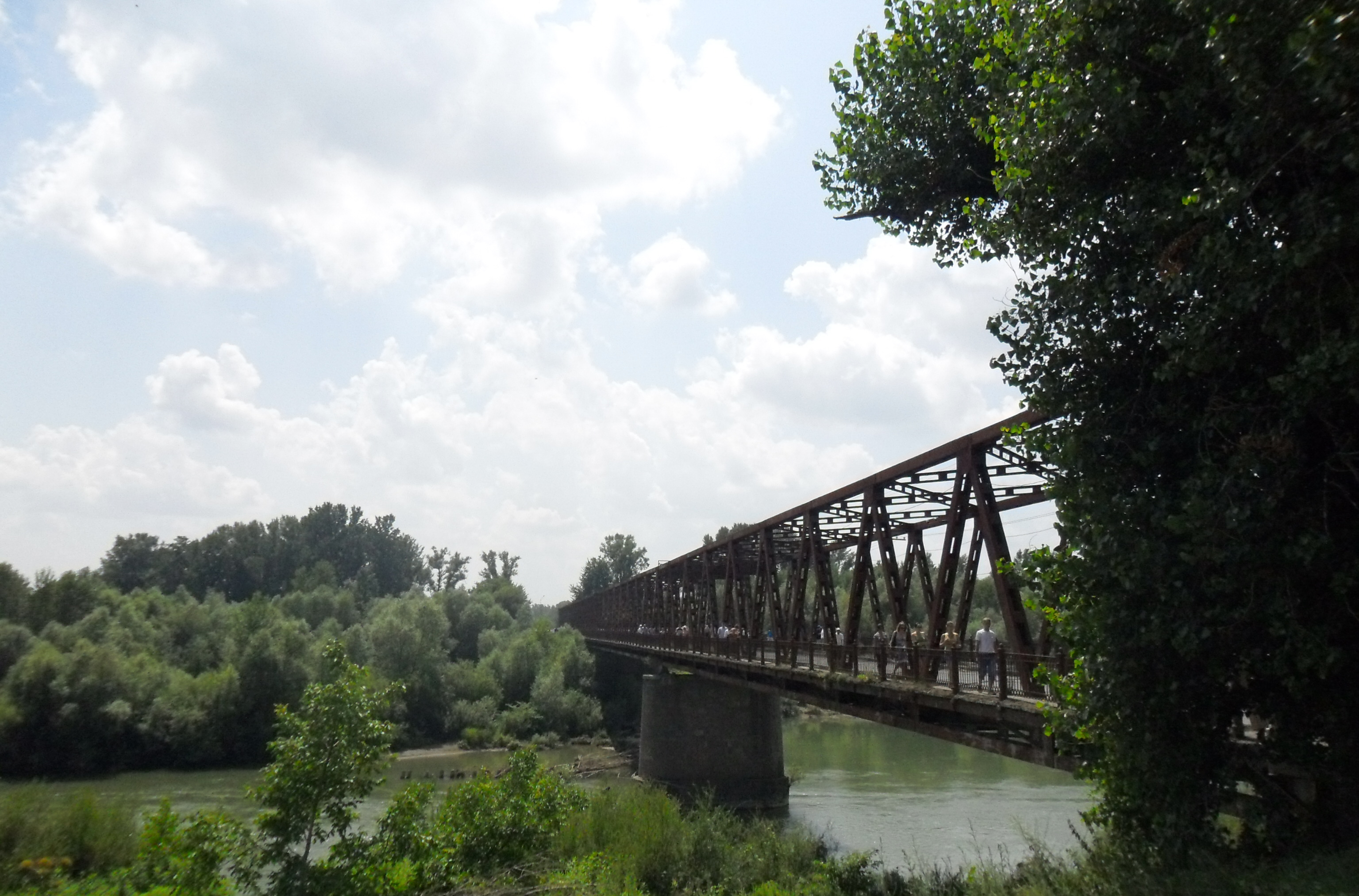 A tiszaújlaki Tisza-híd (Kárpátalja, Ukrajna)